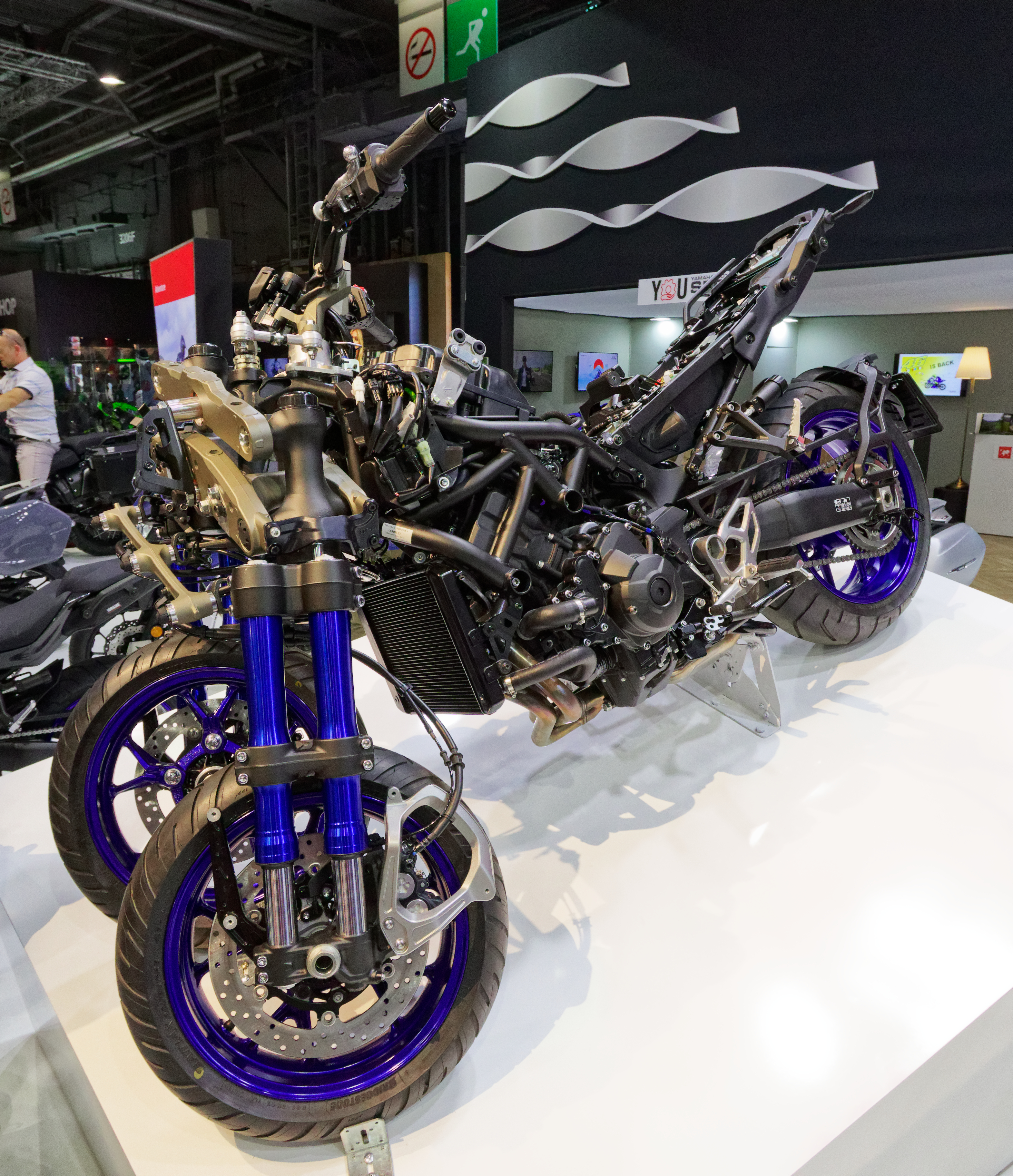 Une Yamaha Niken exposée lors du mondial de l'automobile de Paris 2018.